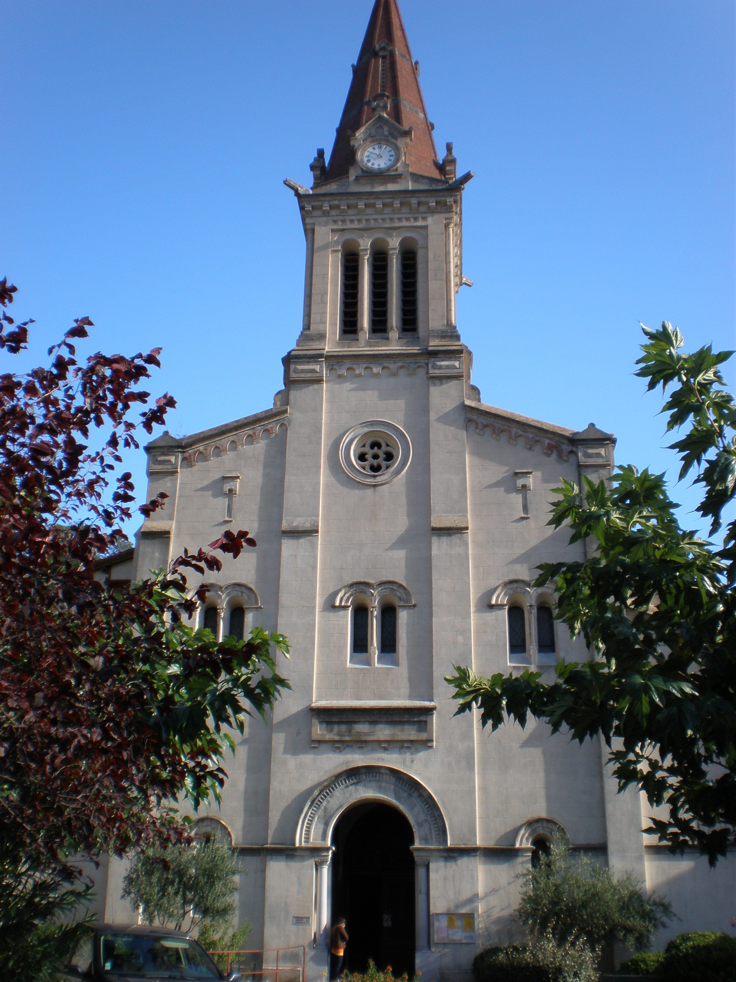 l'église Saint-Quentin d'Amélie-les-Bains (Pyrénées-Orientales, France)